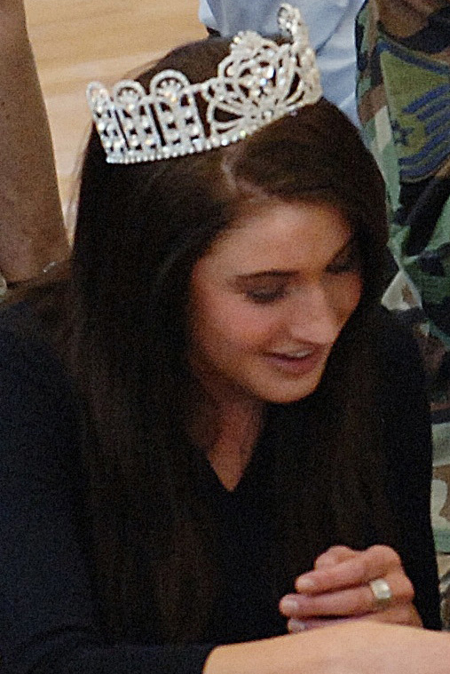 Miss Utah Teen USA 2007 Kelsey Brigel